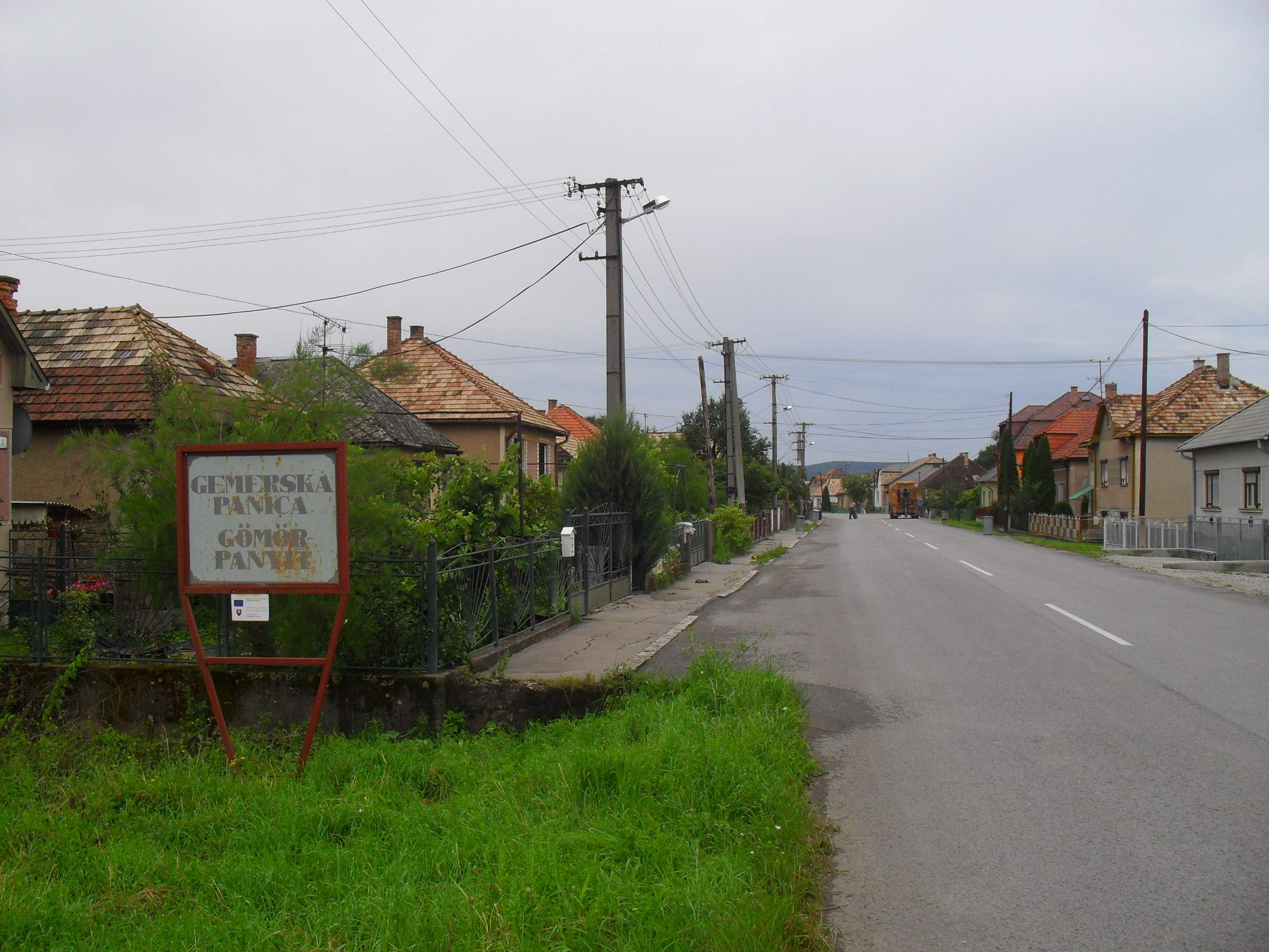 Gömörpanyit - utcakép